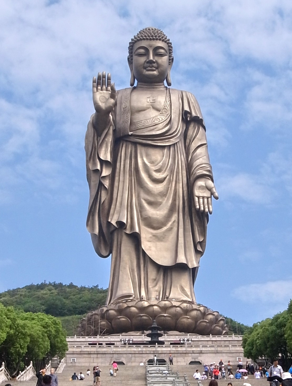 灵山大佛